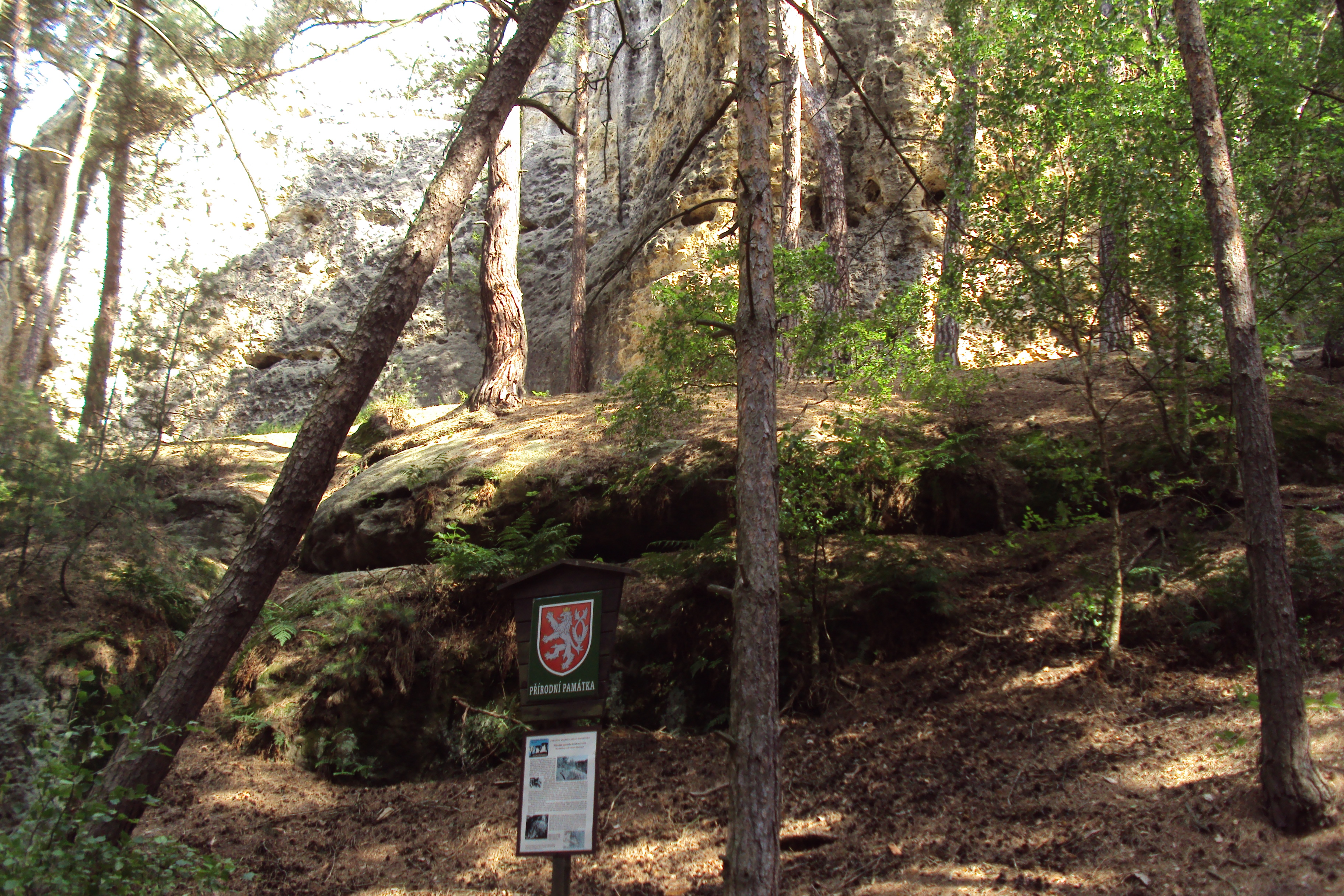 Přírodní památka na Kokořínsku